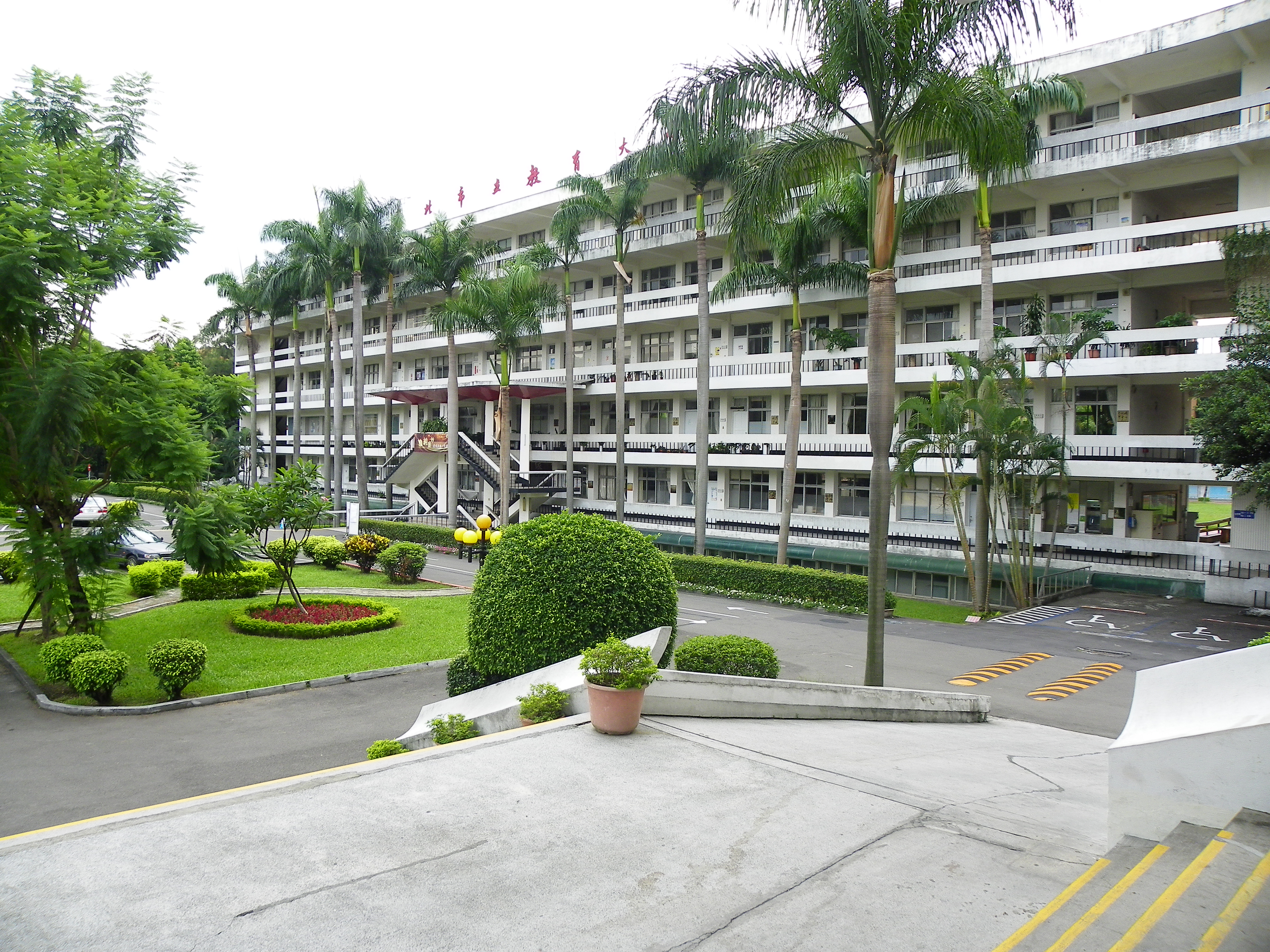 臺北市立教育大學行政大樓與前庭。